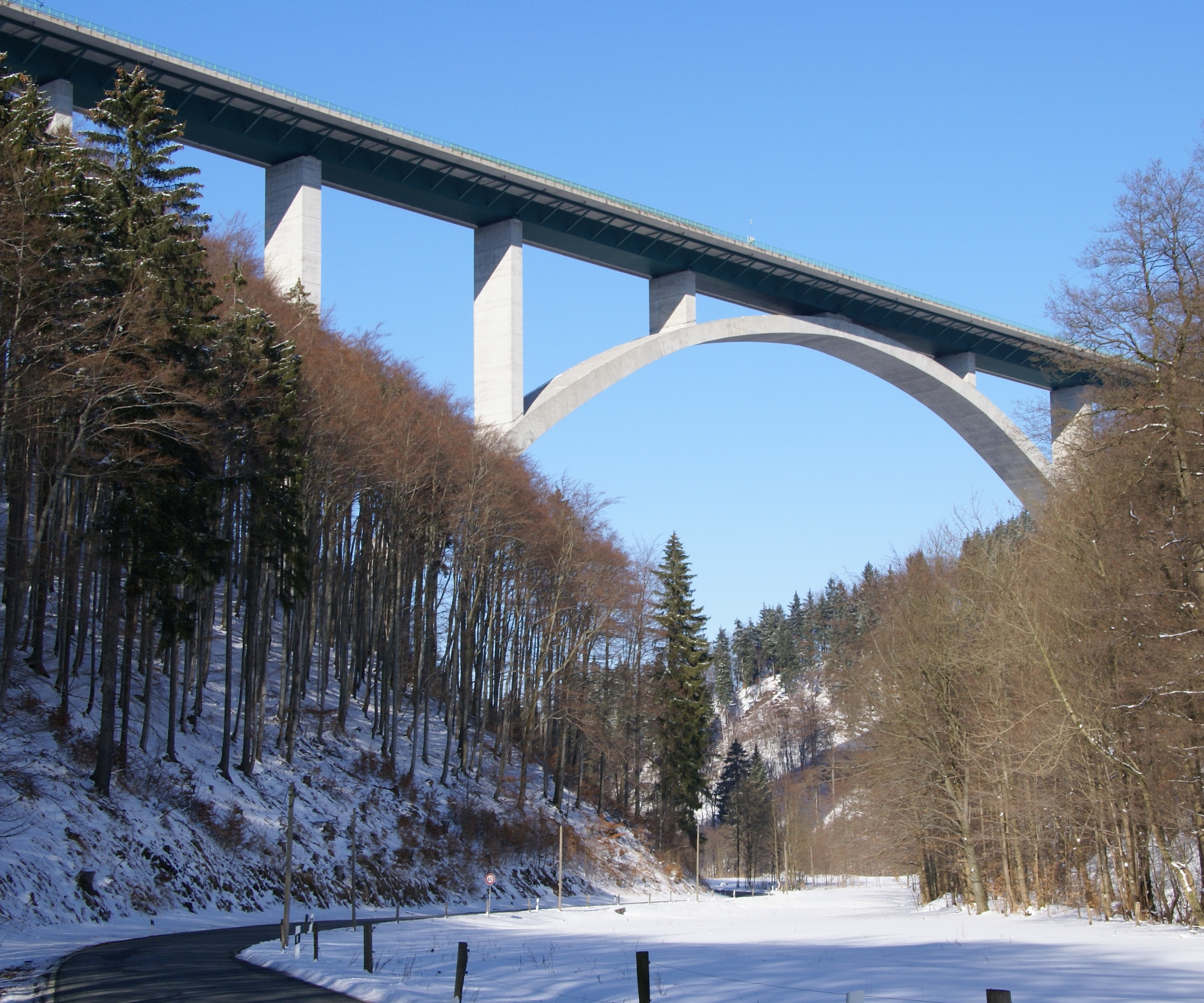 Talbrücke Wilde Gera - der Bundesautobahn 71